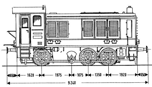 Plan du locotracteur SNCF Y 50100.